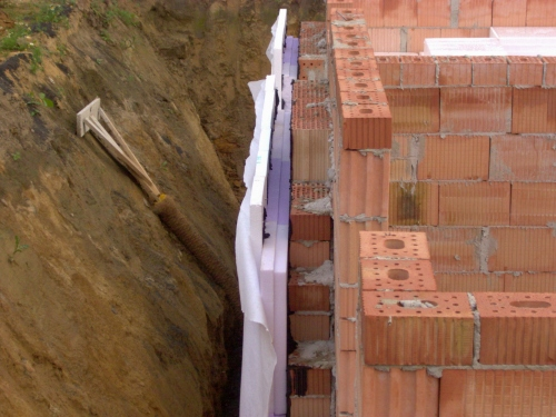 Selbst fotografiert, gemeinfrei --Wikisearcher 00:05, 5. Mai 2005 (CEST)